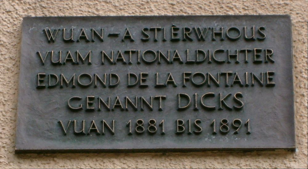 D'Plaque um Dicks sengem Stierwhaus zu Veianen, 26. Mäerz 2008